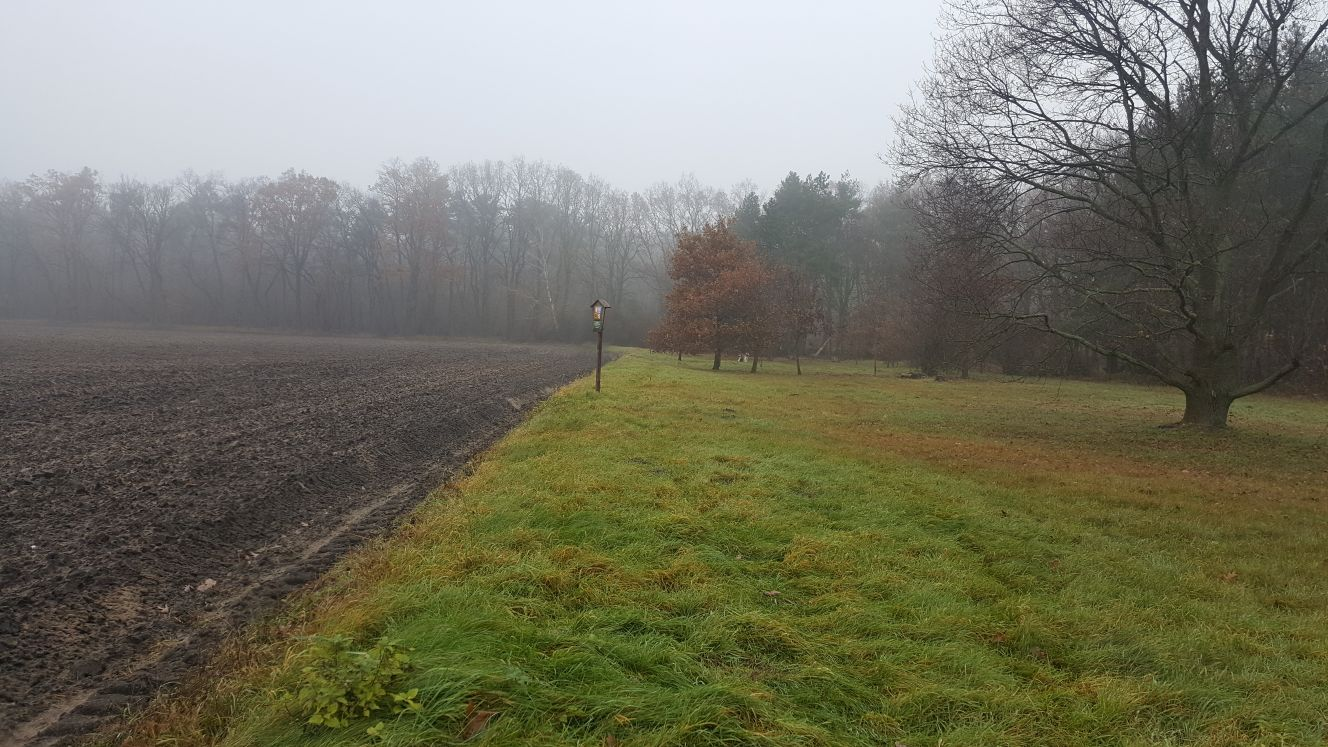 NPP Slatinná louka u Velenky leží vedle zemědělské půdy